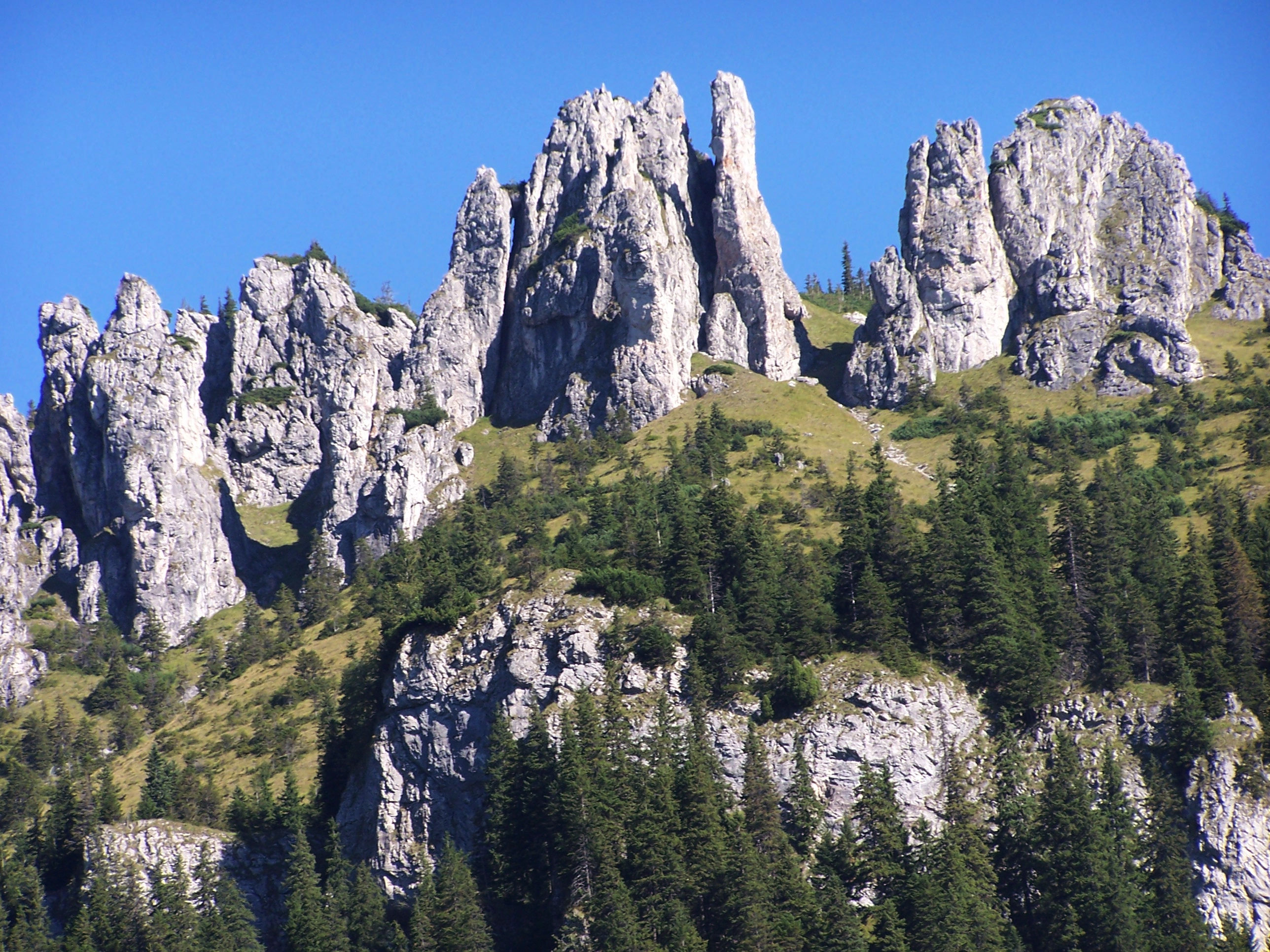 Mnichy Chochołowskie (Dolina Chochołowska)